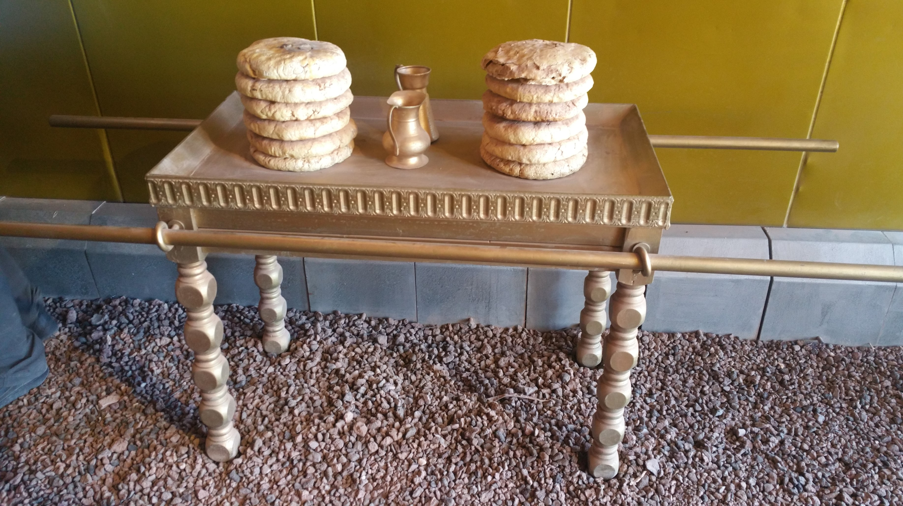 Timna: Stiftshütte, Schaubrote - Tisch